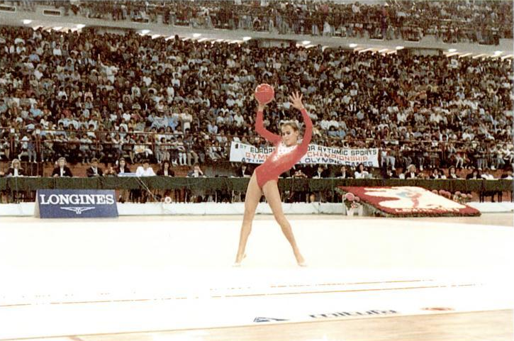 La gimnasta rítmica española Arancha Villar en el Campeonato Europeo Júnior de Atenas en 1987.